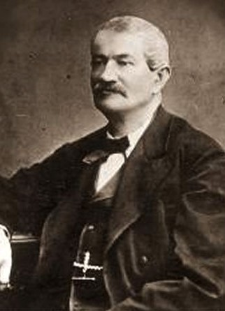 Scheinost Vojtěch, český podnikatel, zakladatel sirkařského průmyslu v Čechách